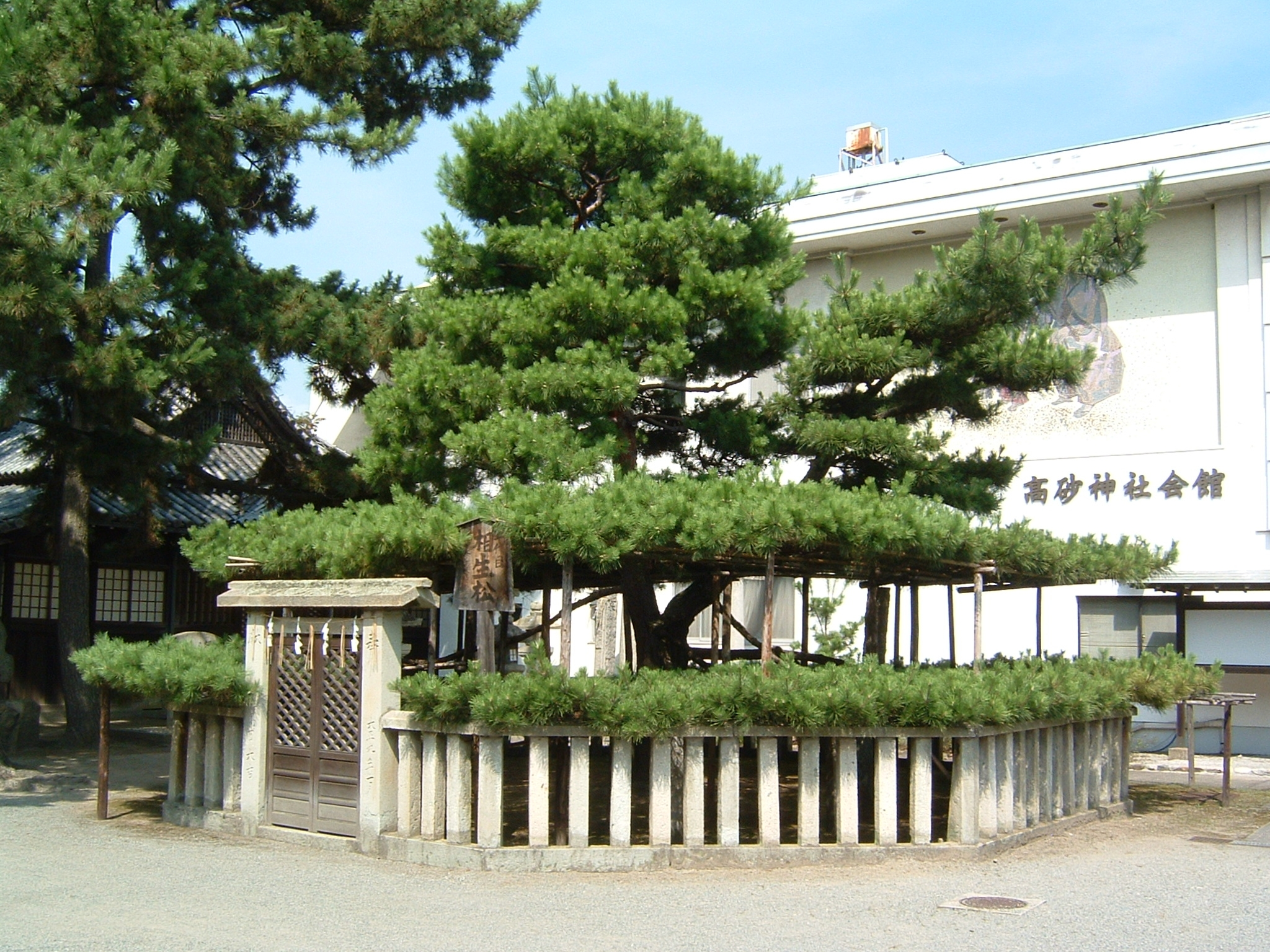 Takasago-jinja (高砂神社)